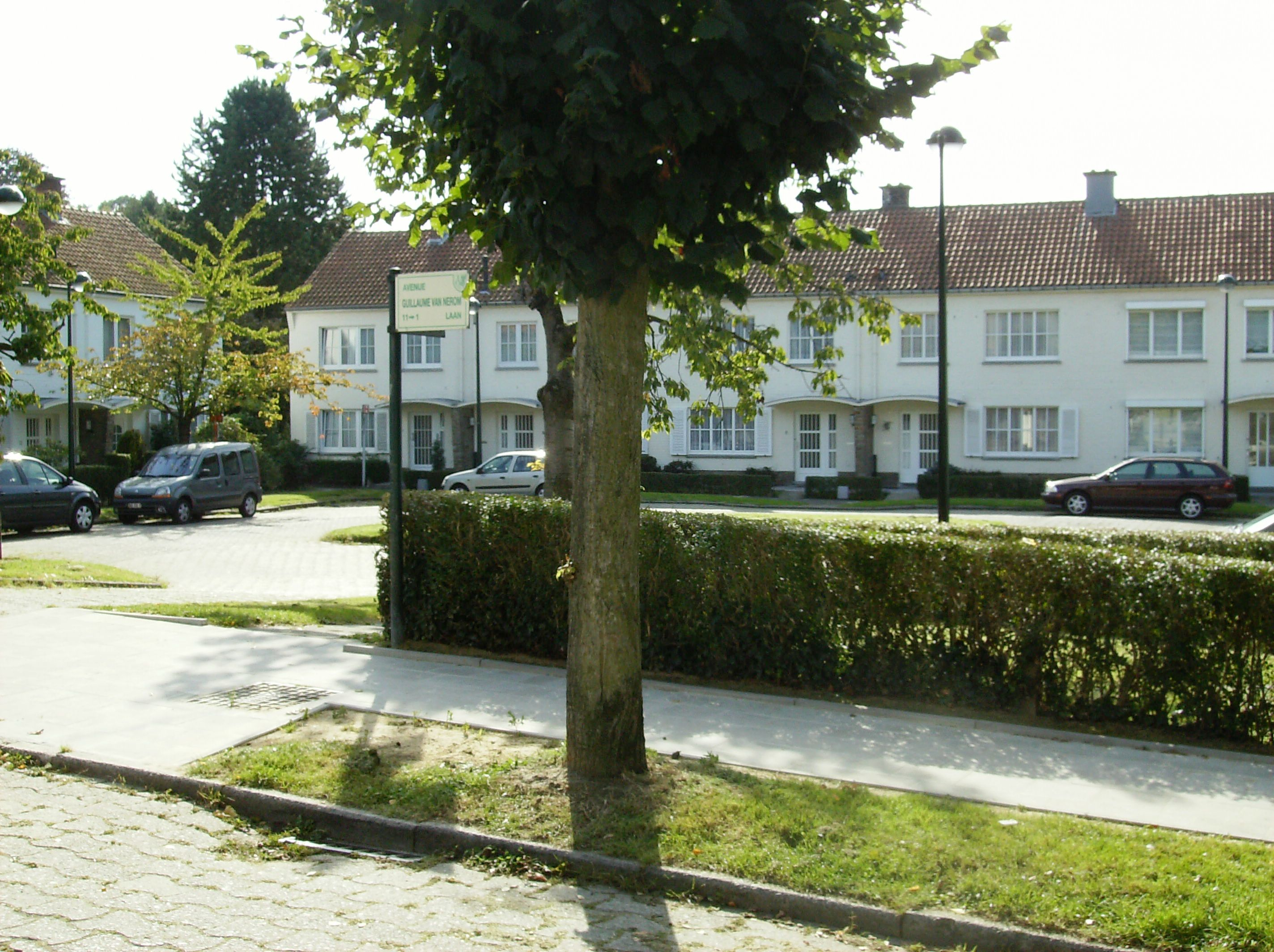 square Georges Golinvaux Auderghem